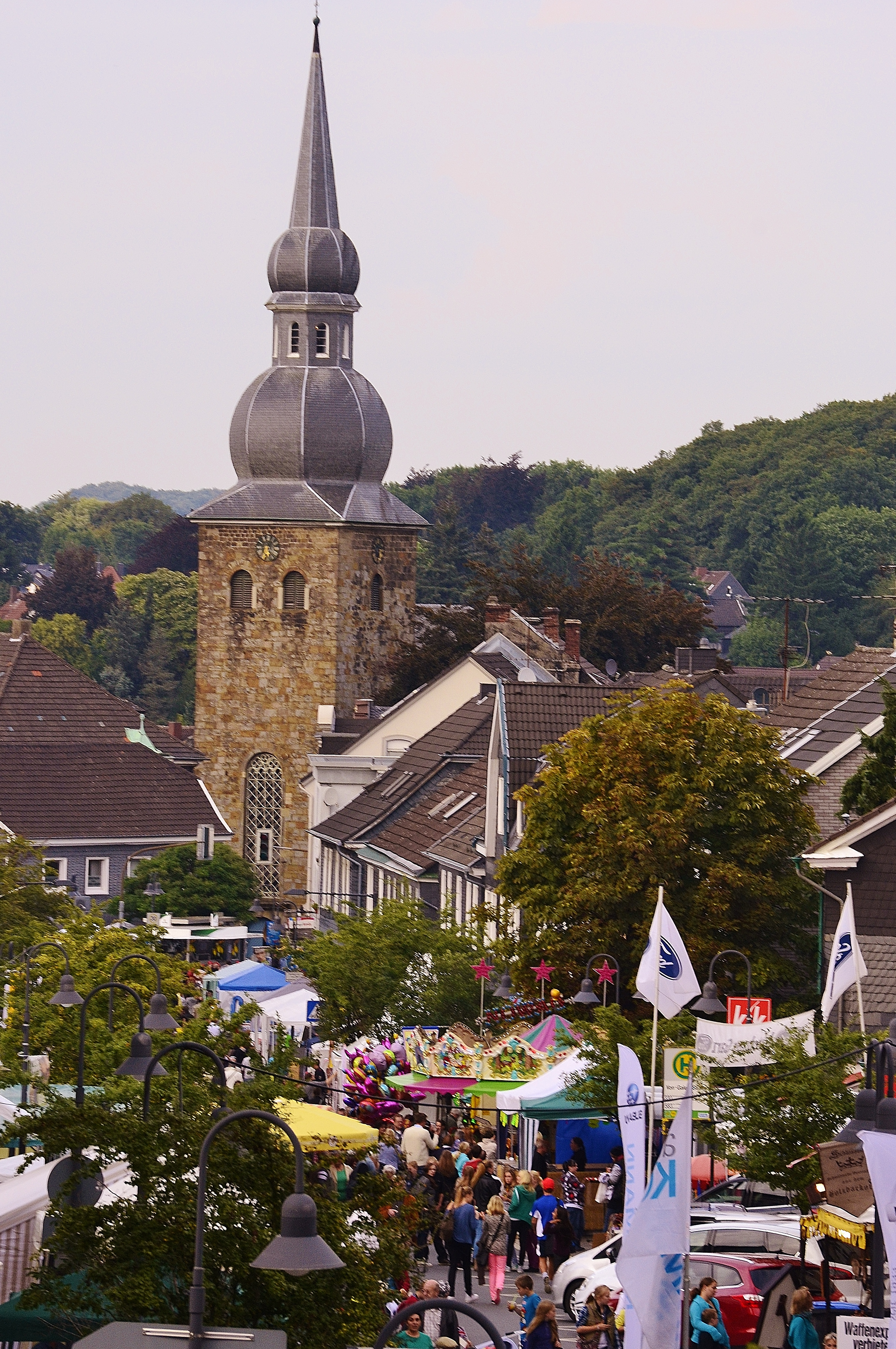 19. Stadtfest in Niedersprockhövel 2013, Blick zur evangelischen Kirche Niedersprockhövel